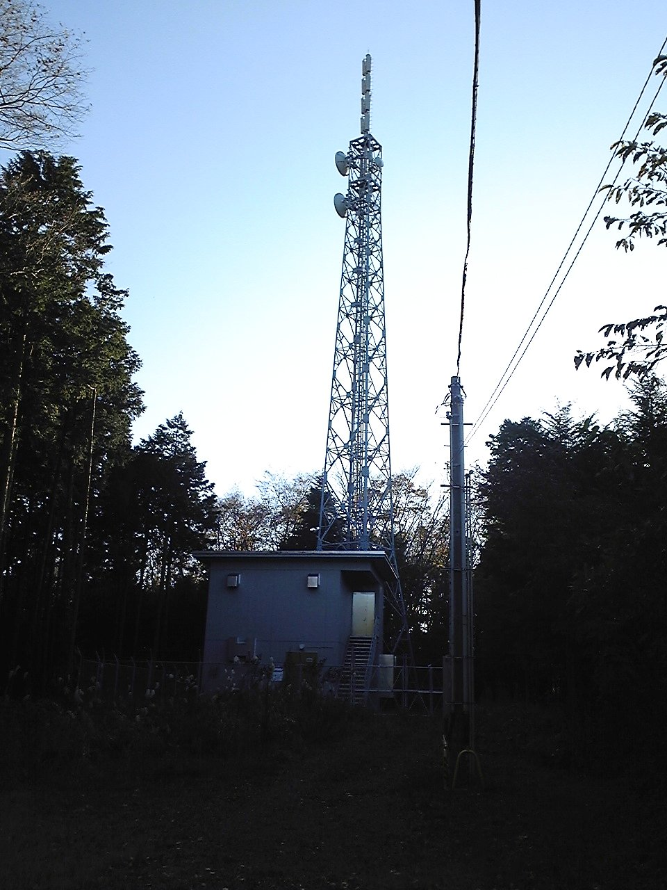 御殿場地上デジタルテレビジョン中継局の写真。